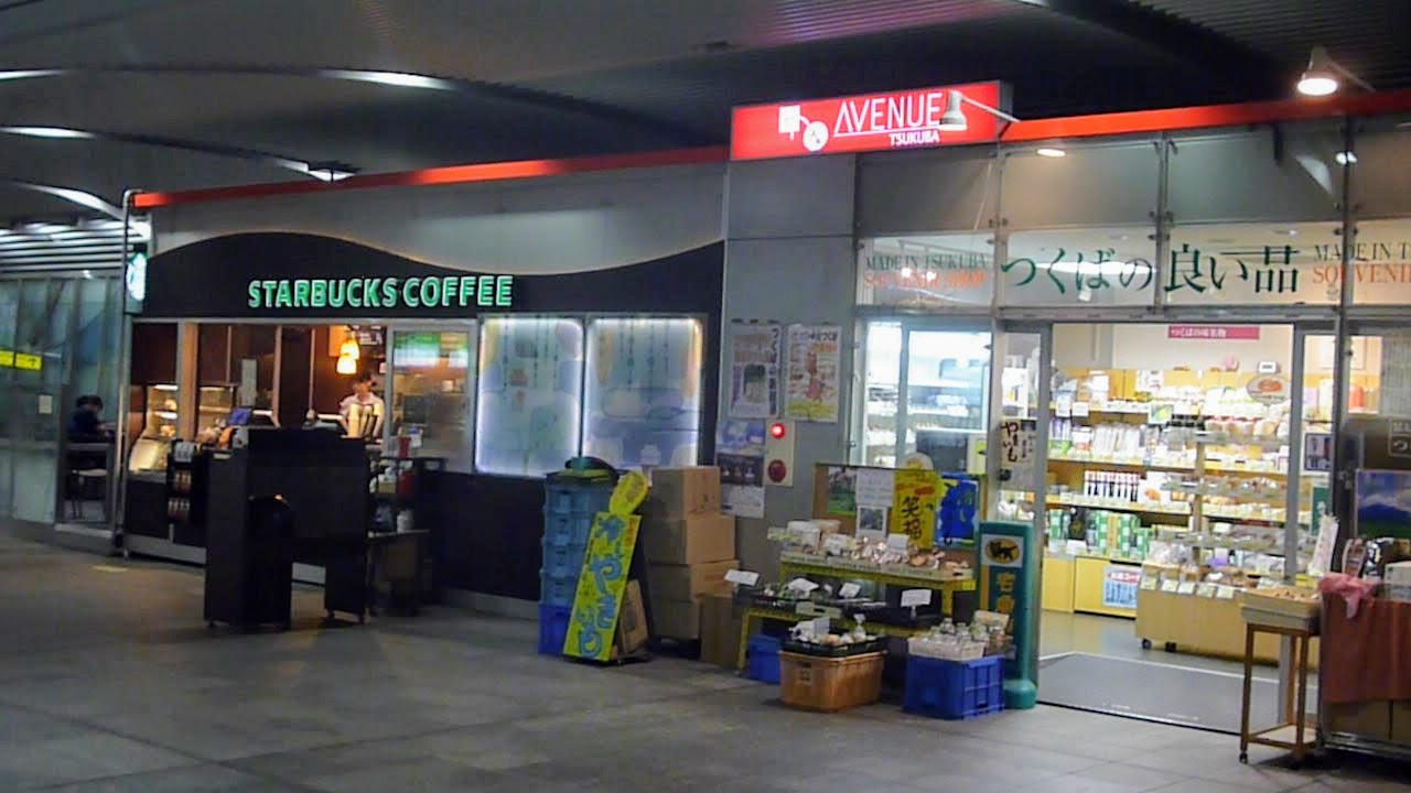 つくば駅前の南北自由通路にあるTXアベニューつくば。